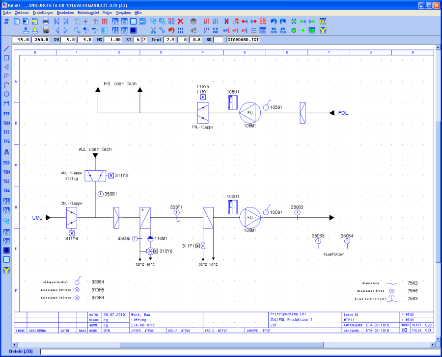 KiCAD Prinzipschema